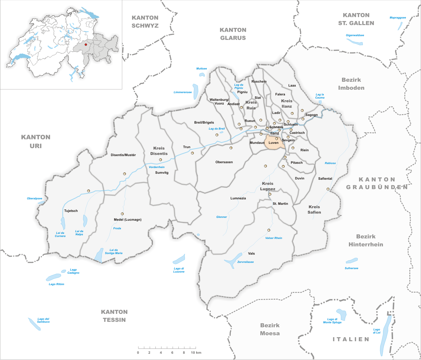 Municipality Luven